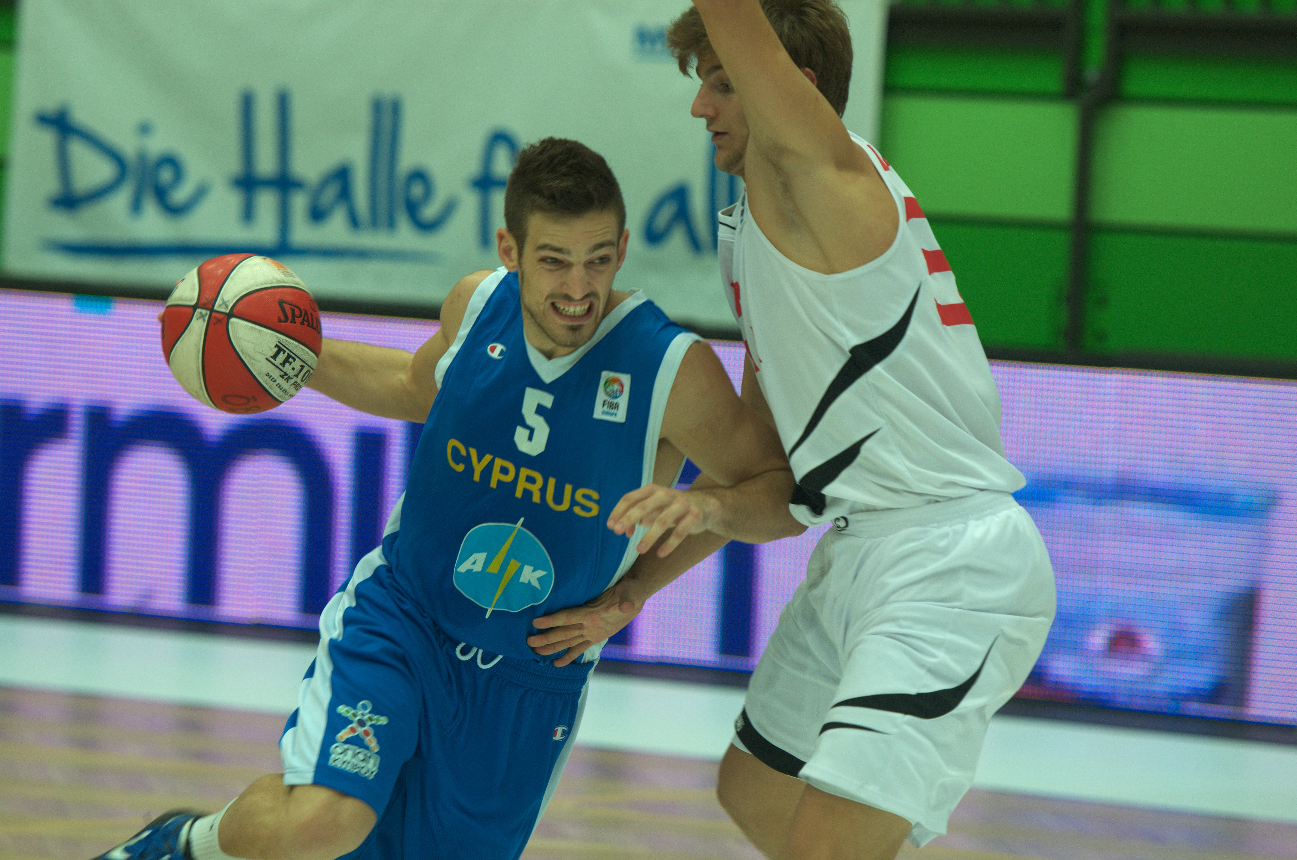 Christopher Razis und Moritz Lanegger